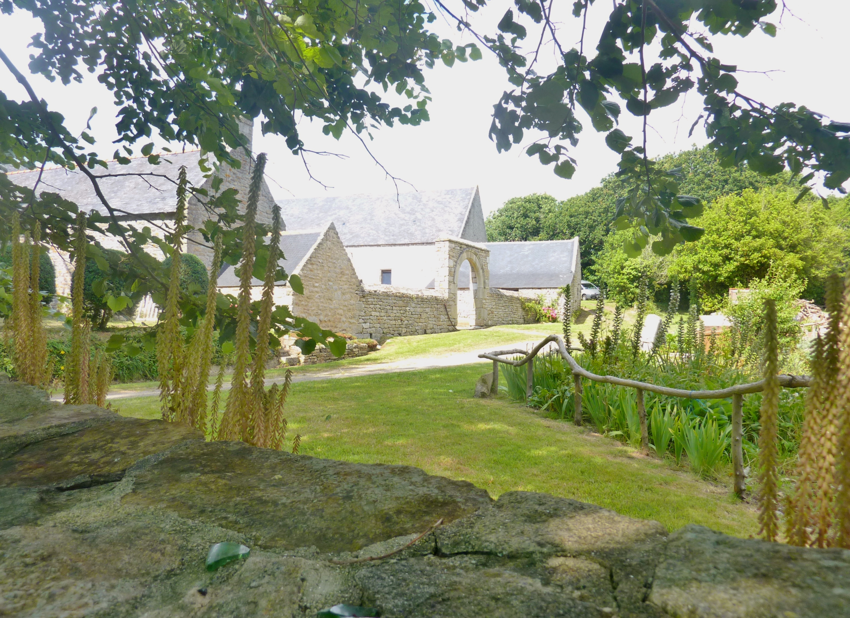 Plobannalec-Lesconil : le manoir de Kerhoas, demeure seigneuriale bigoudène du XVe siècle